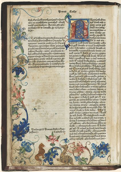 Pierwszy drukowany przekład Pisma Świętego w języku czeskim (1488).